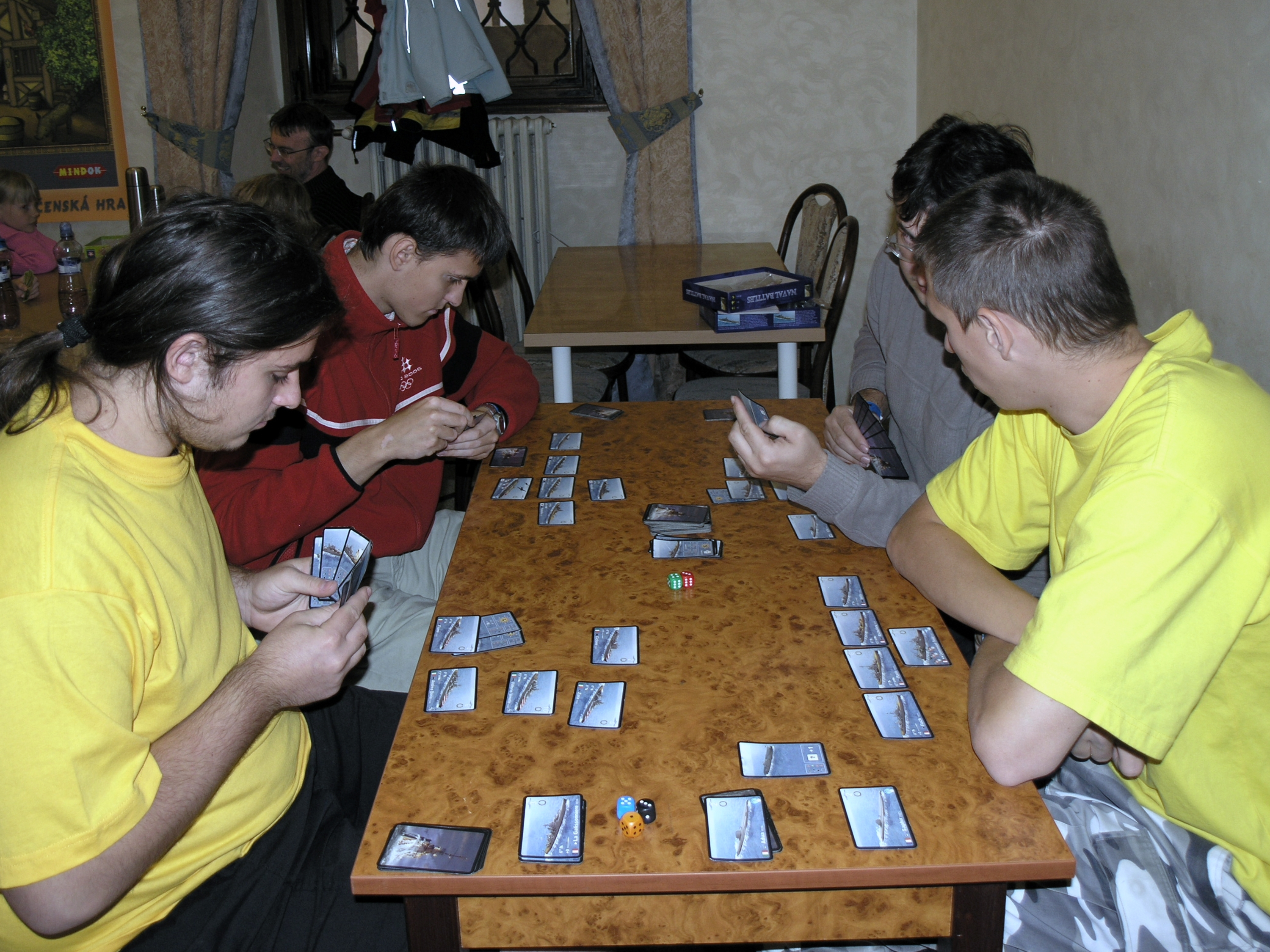 Deskohraní 2008 - Volné hraní, Naval Battles